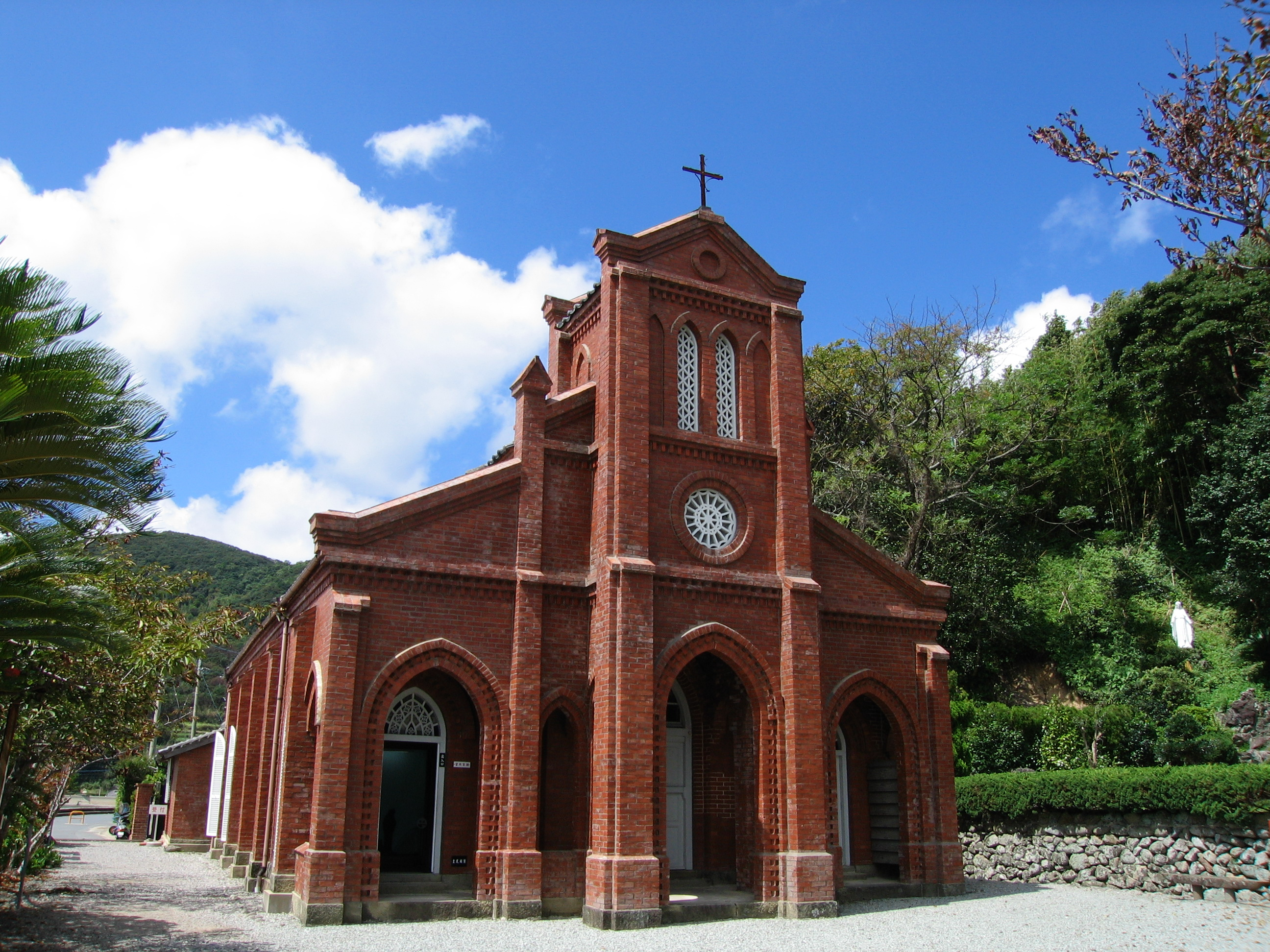 Douzaki Church(堂崎教会) in goto, Nagasaki, Japan